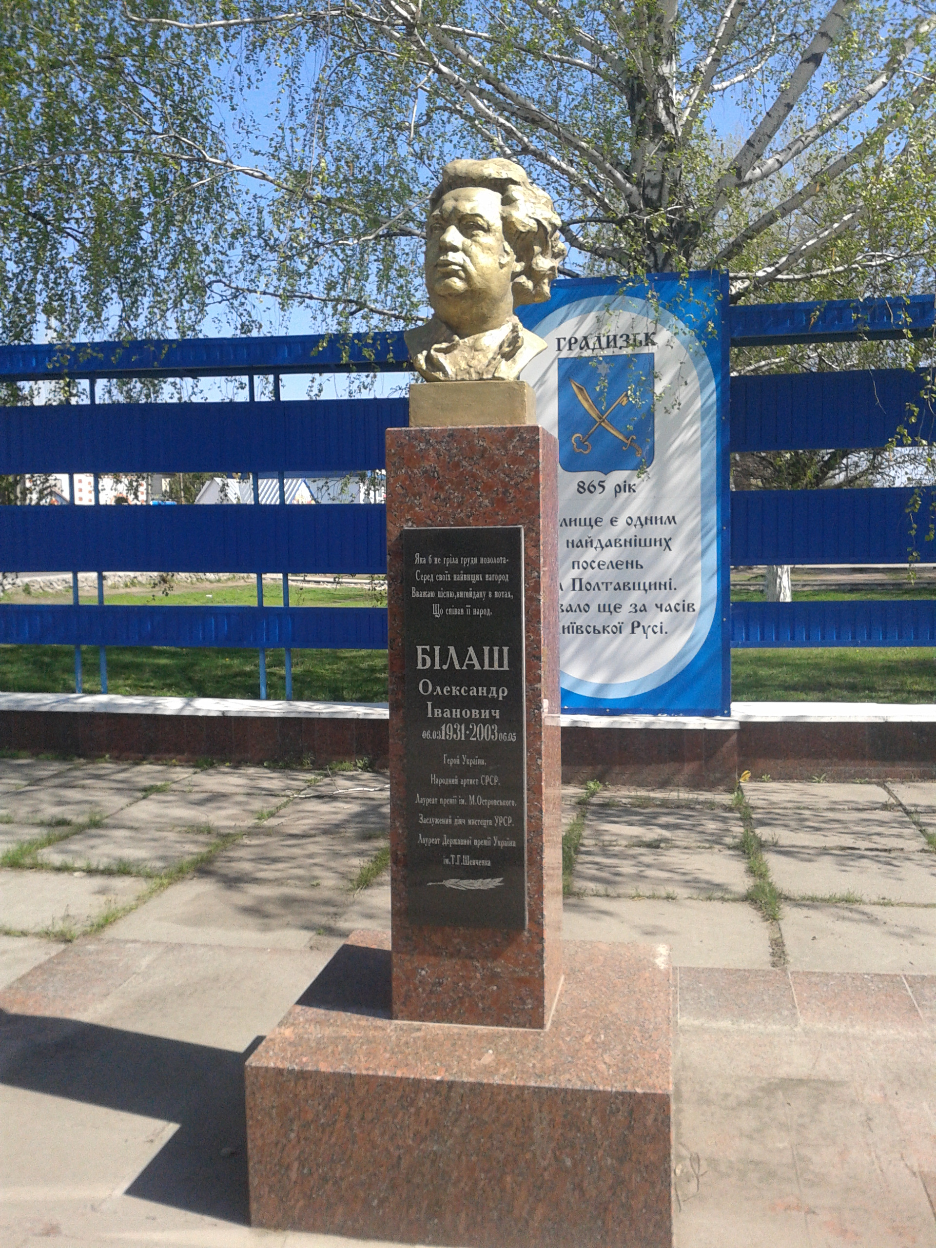 Пам'ятник композитору Олександру Івановичу Білашу у Градизьку